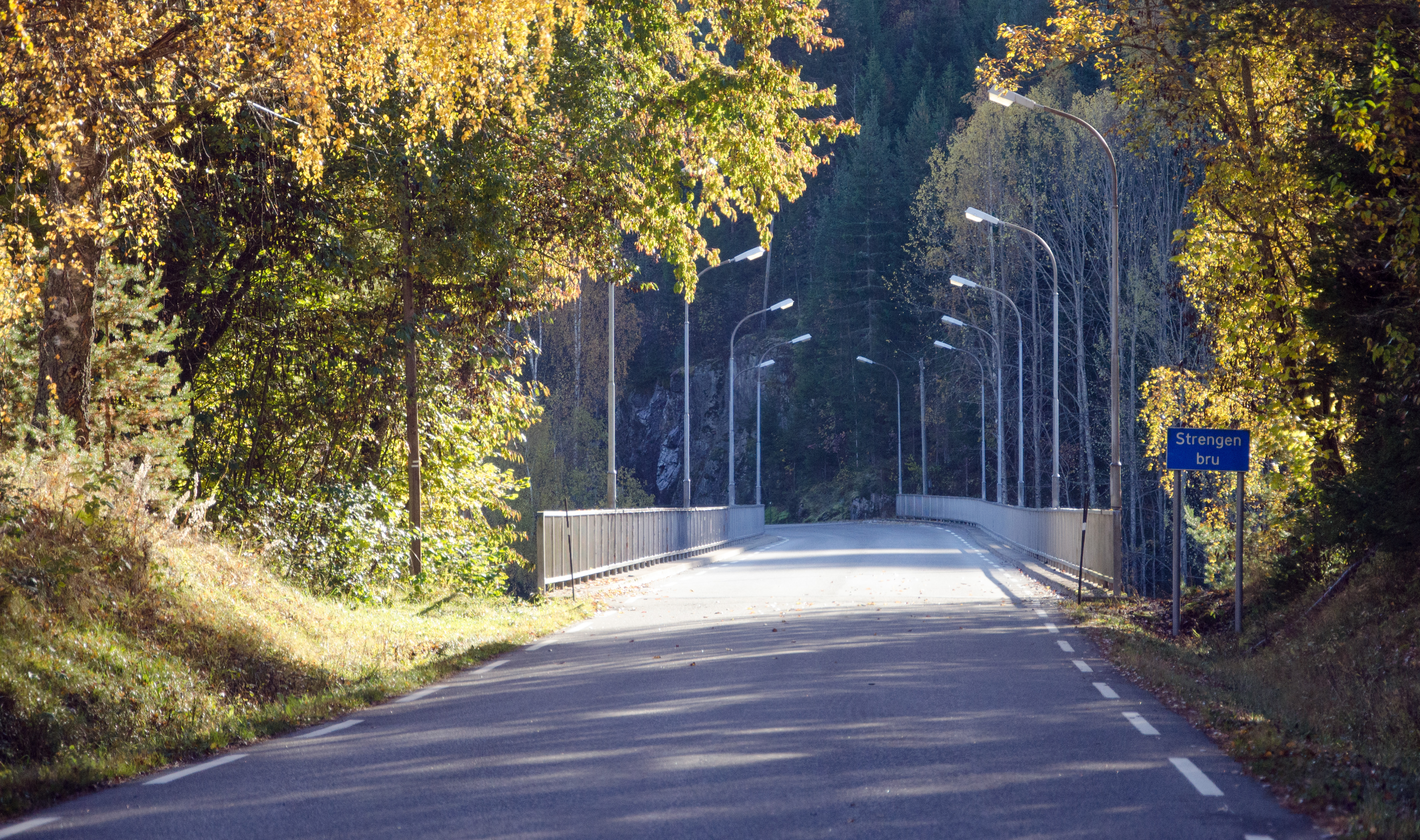 Strengen bru på fylkesvei 107 i Telemark